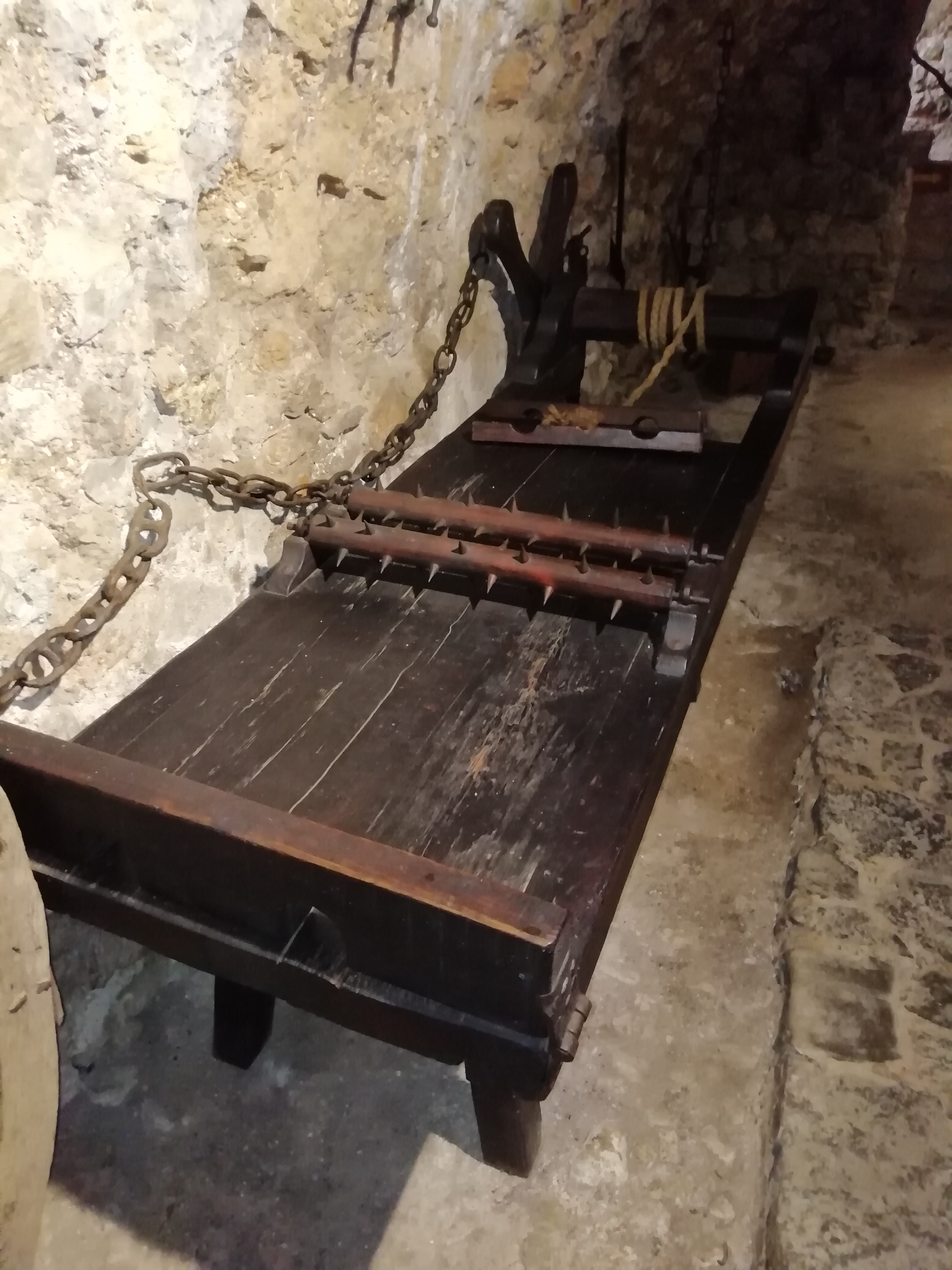 Mesa de tortura en la finca Sa Granja, en Esporlas, Mallorca.